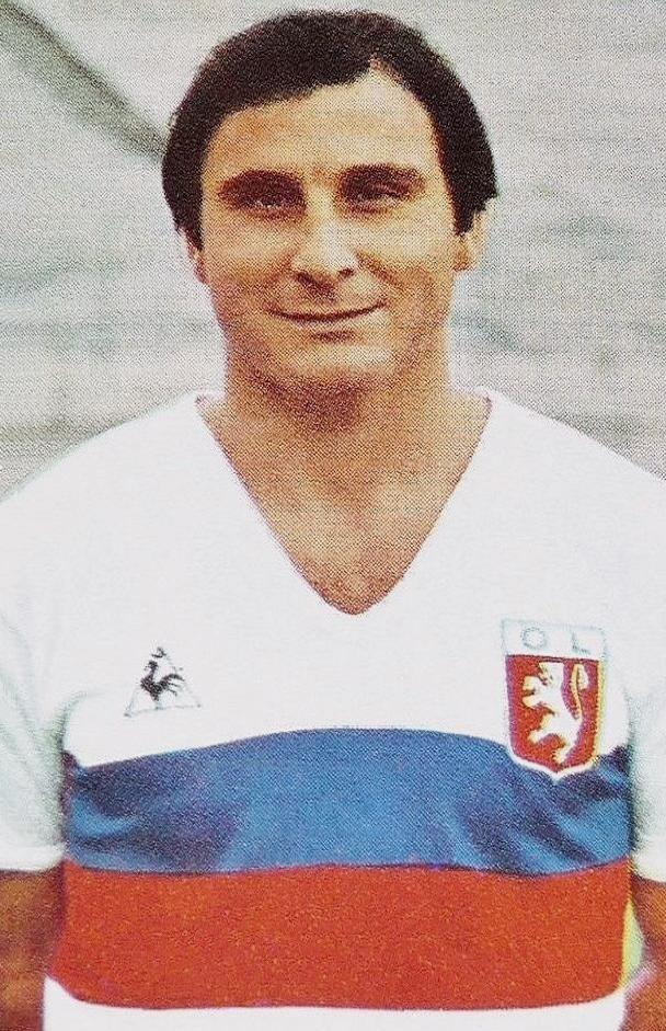 Fleury di Nallo en 1970, 'Ageducatifs Football 1970 - 1971', Panini figurina n°8.